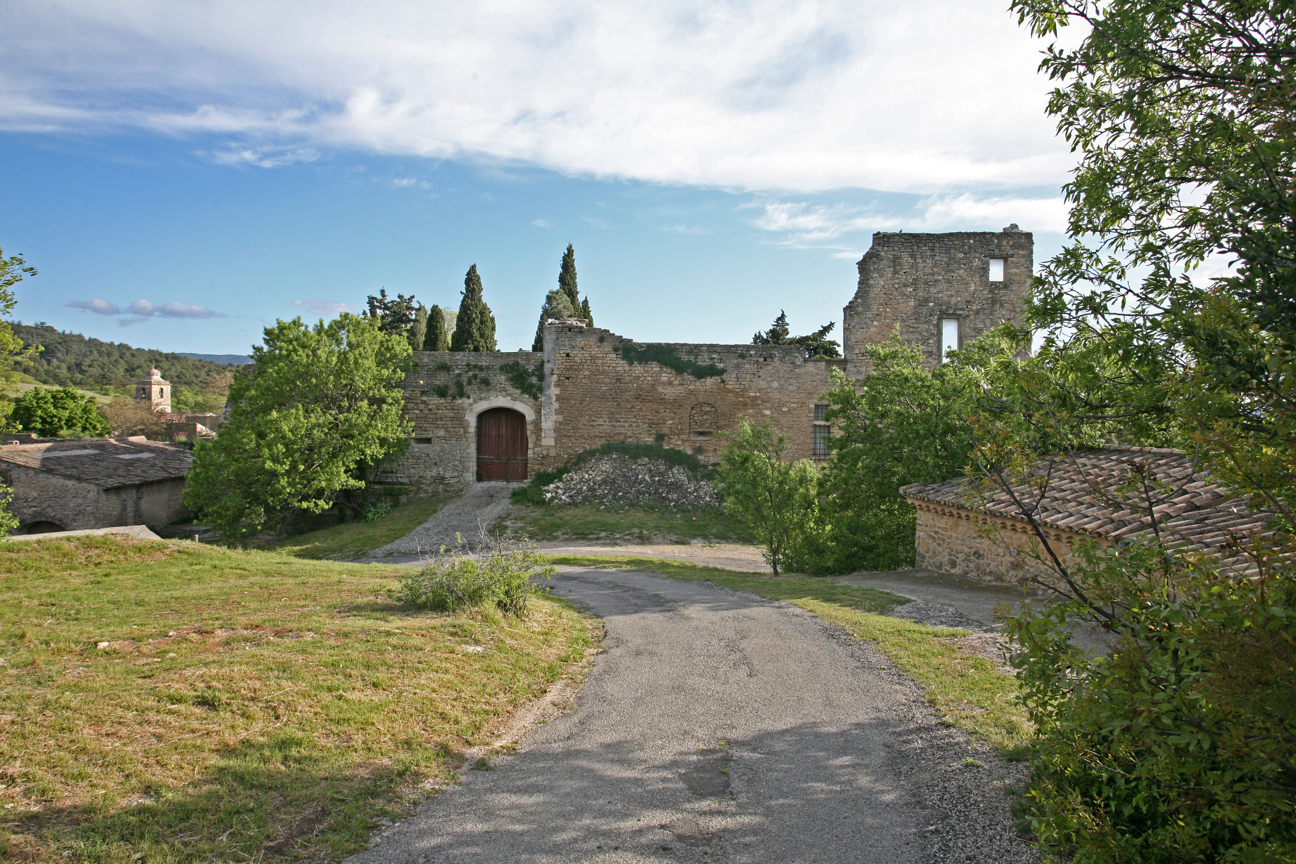 village of Lagnes Vaucluse, France